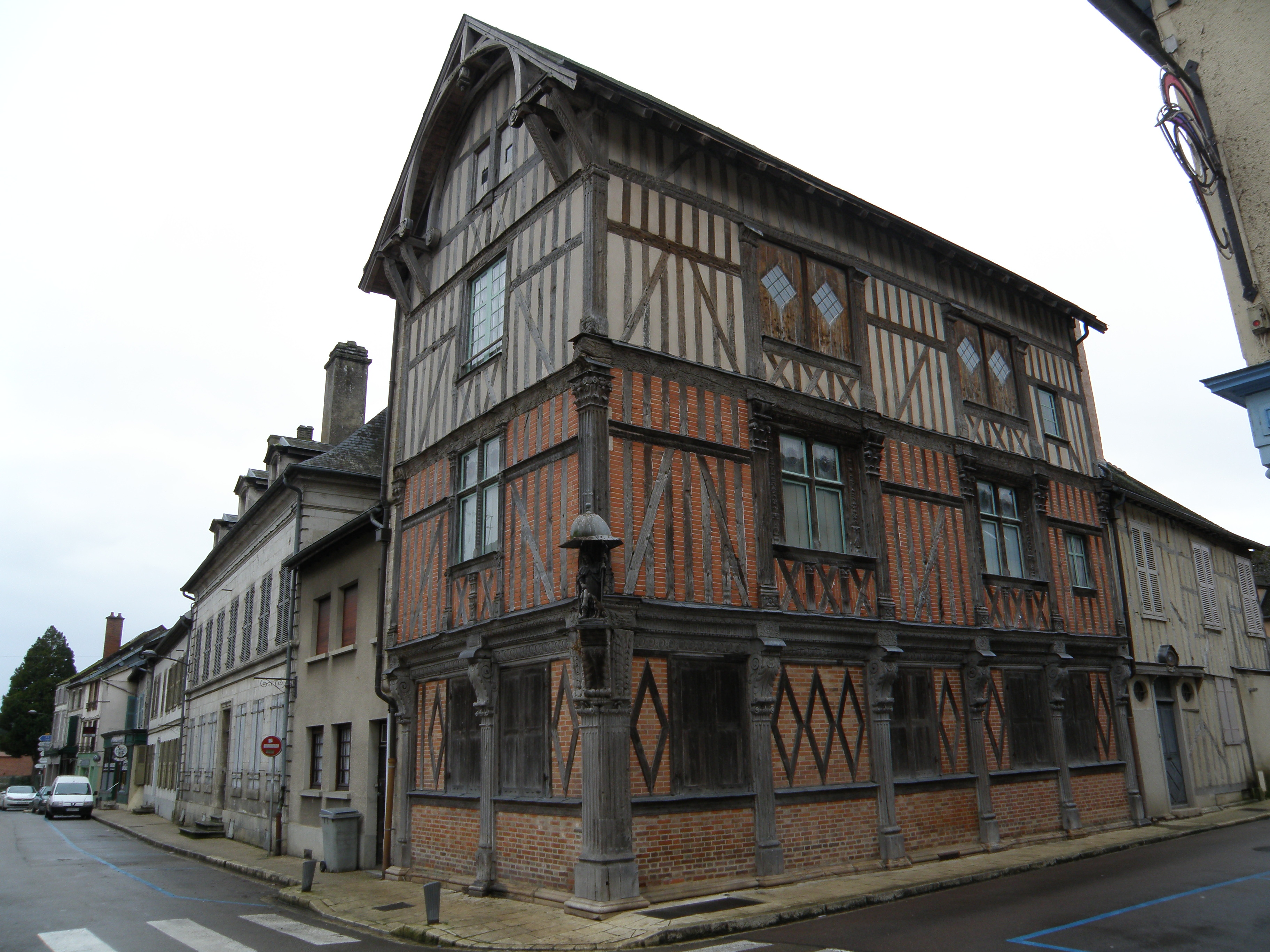 Maison à pans de bois, Rue de République, 10110 Bar-sur-Seine